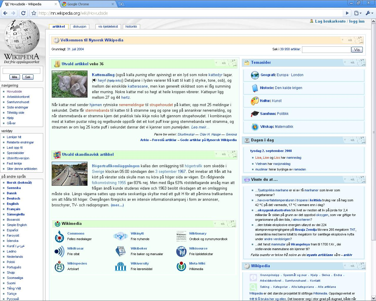 Die Google Chrome-webblaaier.